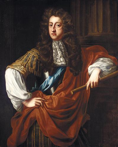 Georg von Dänemark und Norwegen